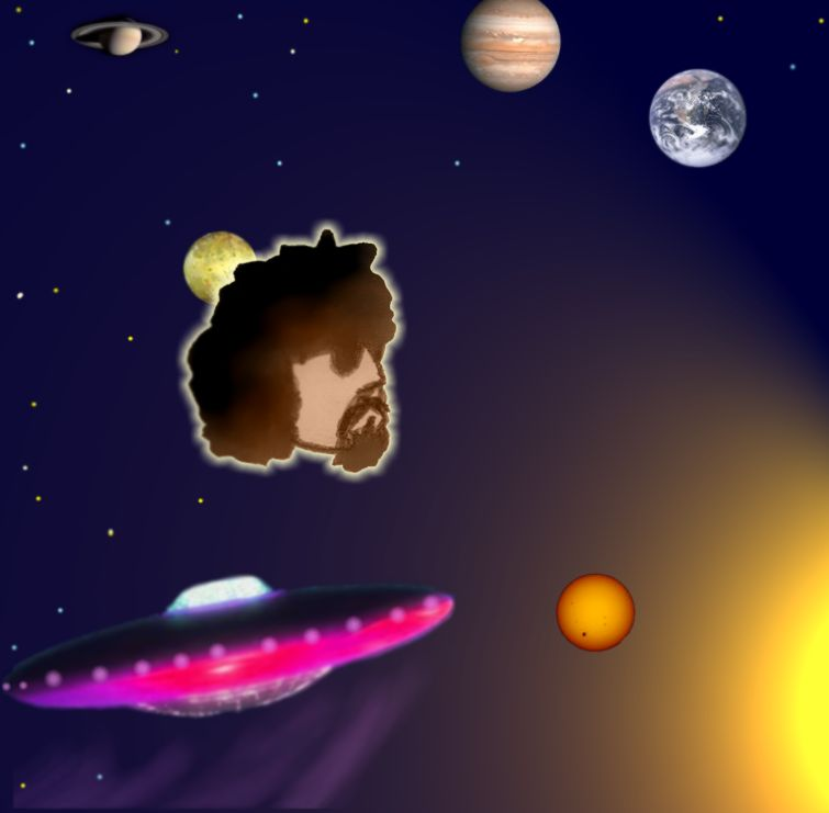 Universo Alternativo - uma fantasia sobre o "Profeta" Raul Seixas feita por André Koehne para a Wiki.